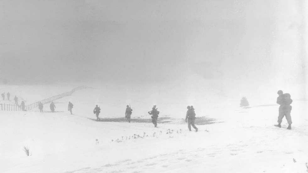 Krinkelt Snow Scene